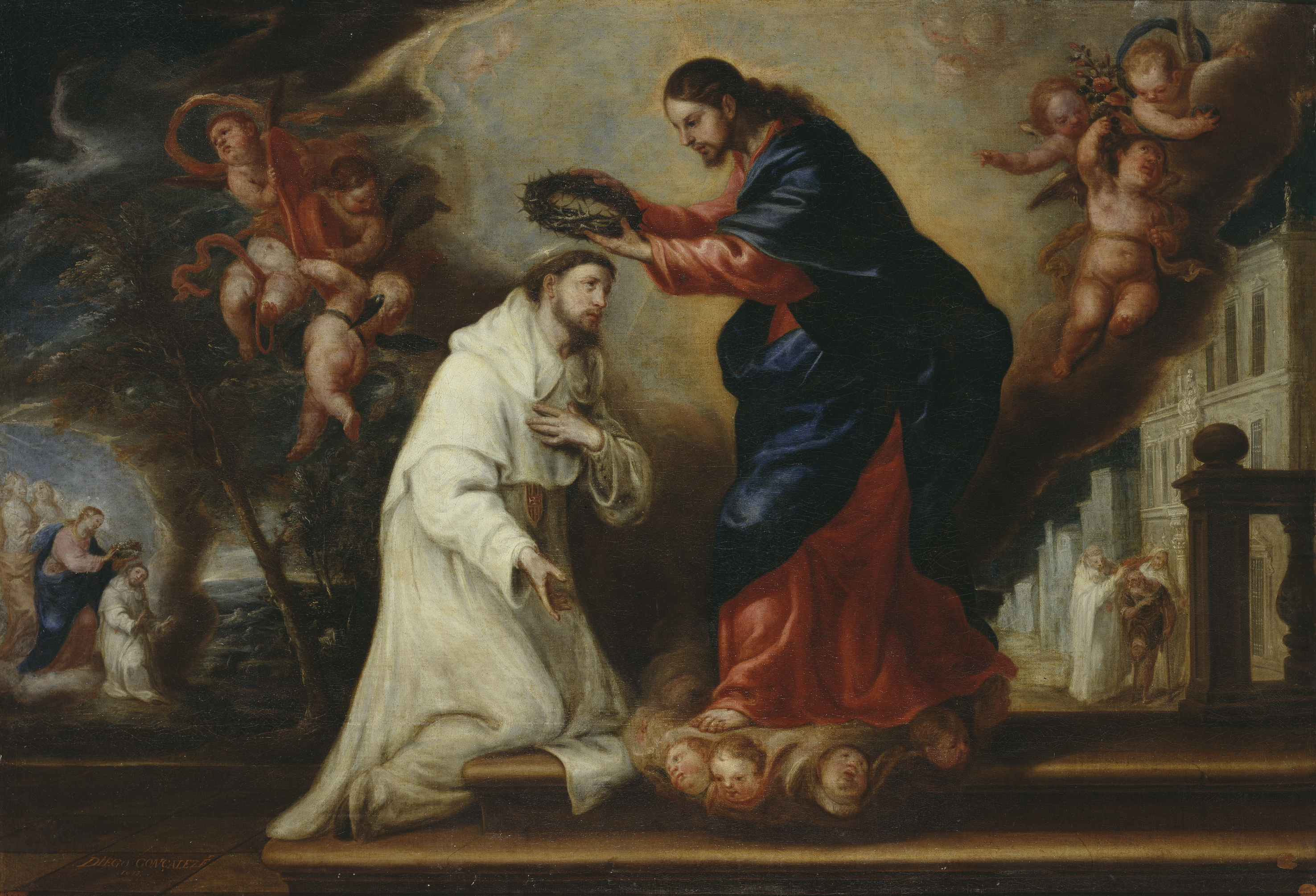 La obra representa a San Ramón Nonato siendo coronado por Jesucristo.